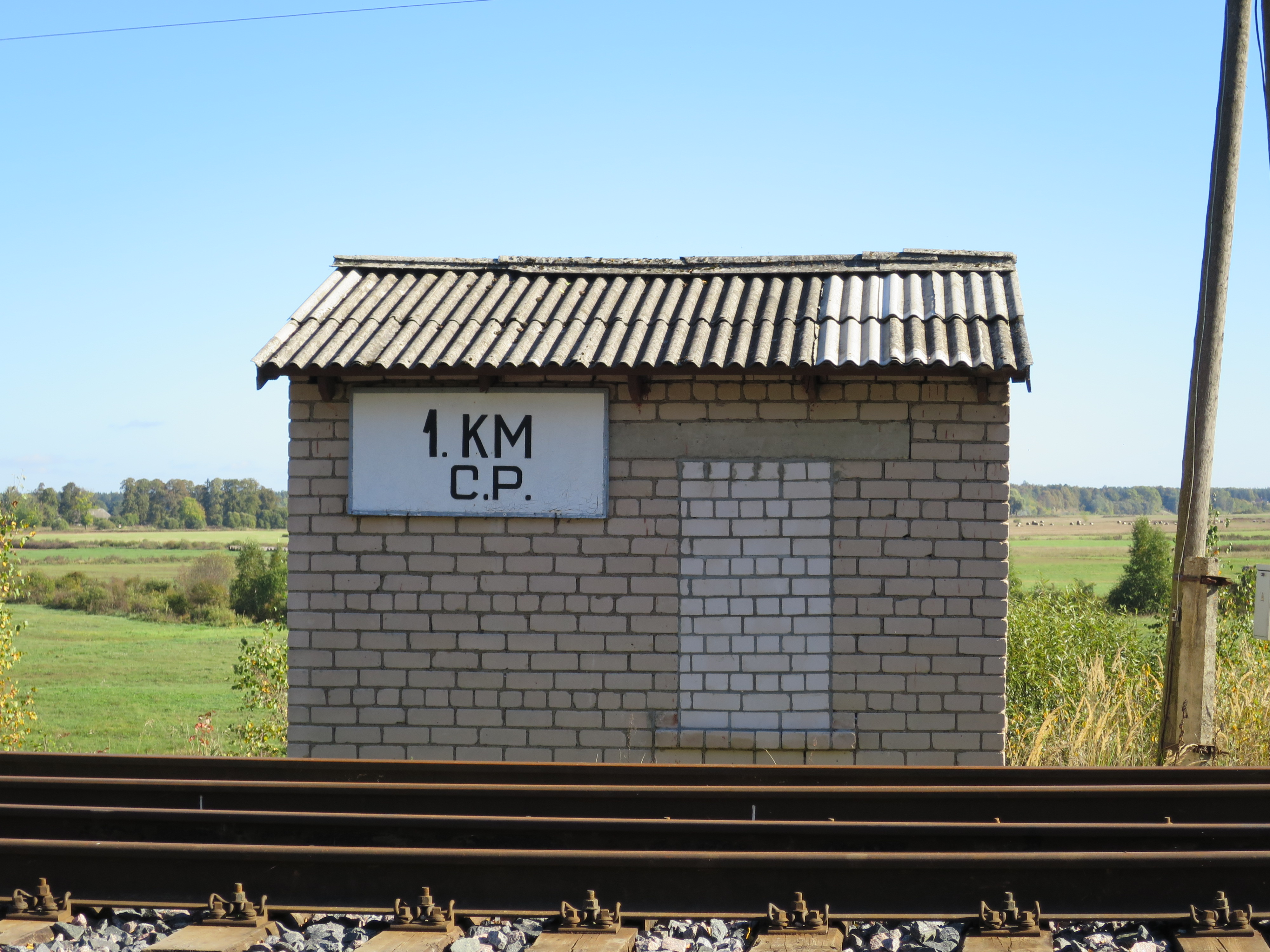 1. kilometra ceļa posteņa ēka